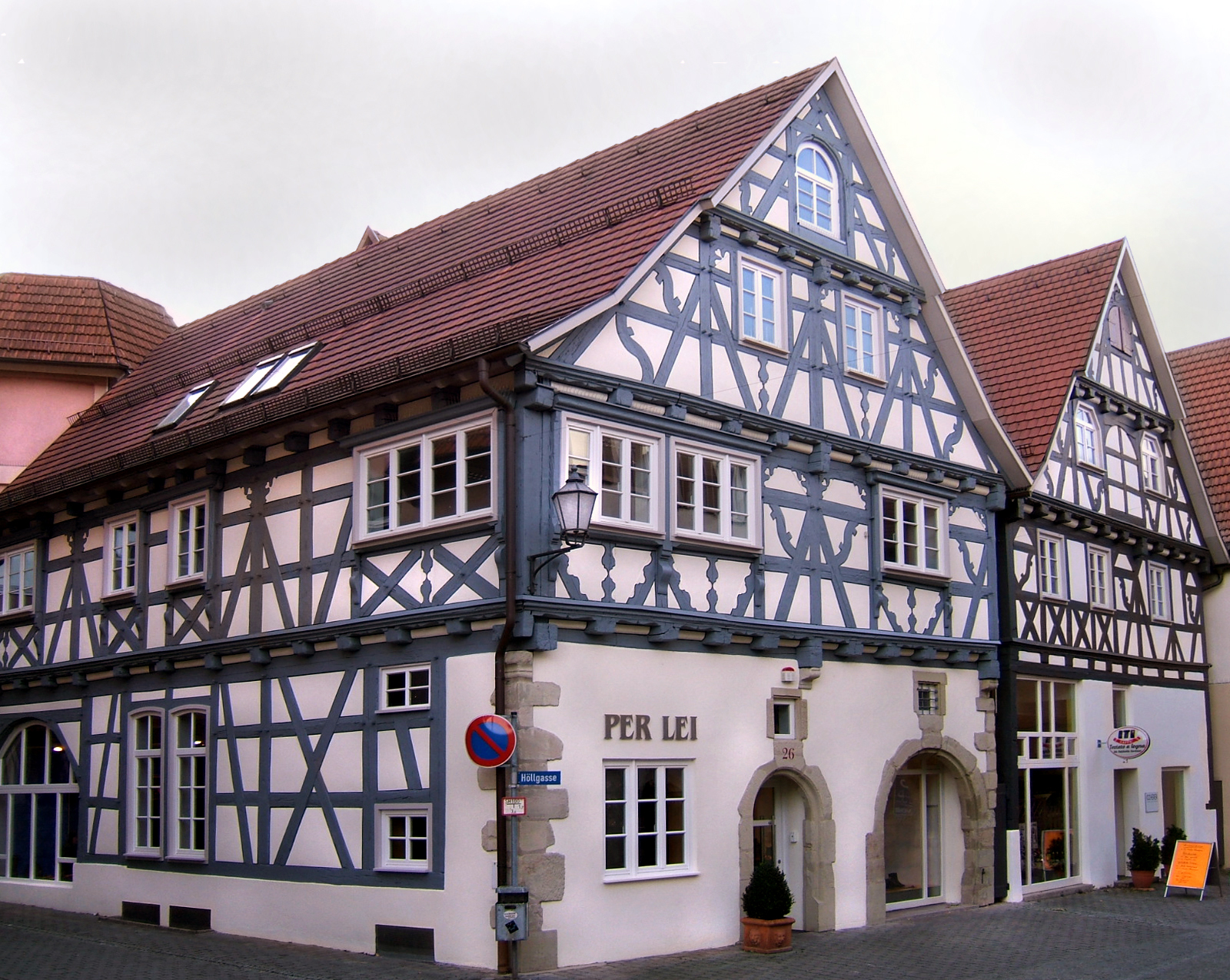 Schorndorf